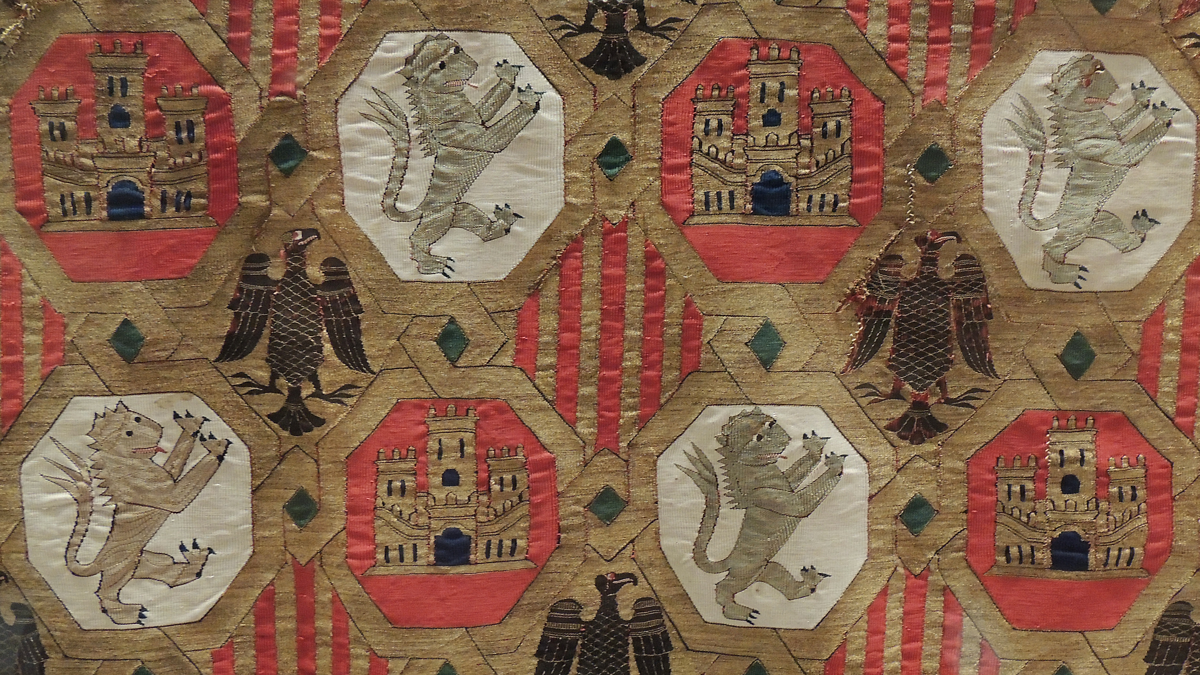 Detalle de la casulla del arzobispo de Toledo Sancho de Aragón, hijo de Jaime I en el museo de tapices y textiles de la catedral de Toledo